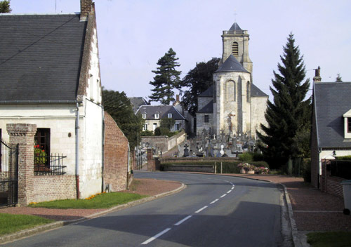 l'église de rivière